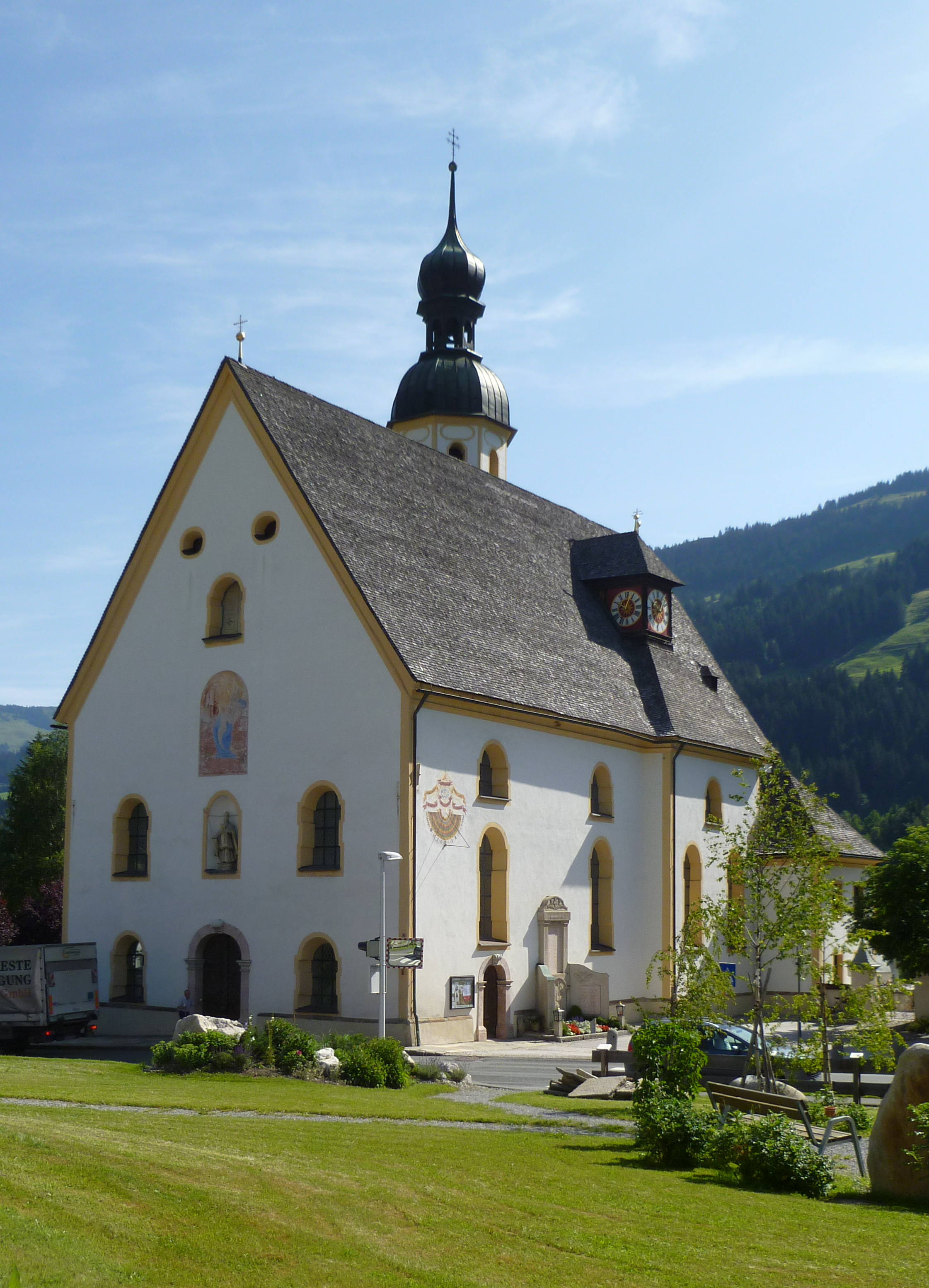 Jochberger Pfarrkirche